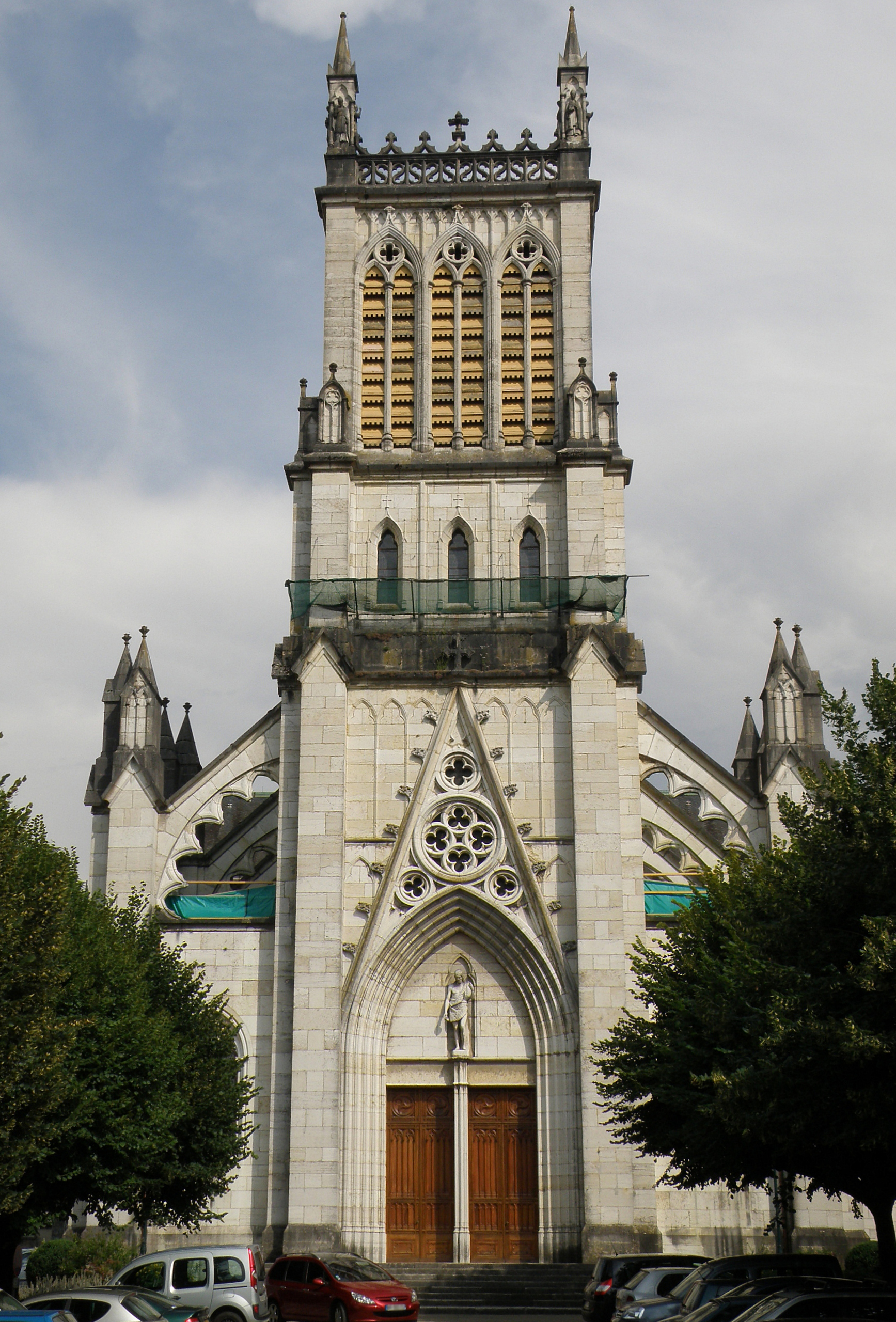 Belley, ville (sous-préfecture) du département de l’Ain (région Rhône-Alpes, France). Cathédrale Saint-Jean-Baptiste.